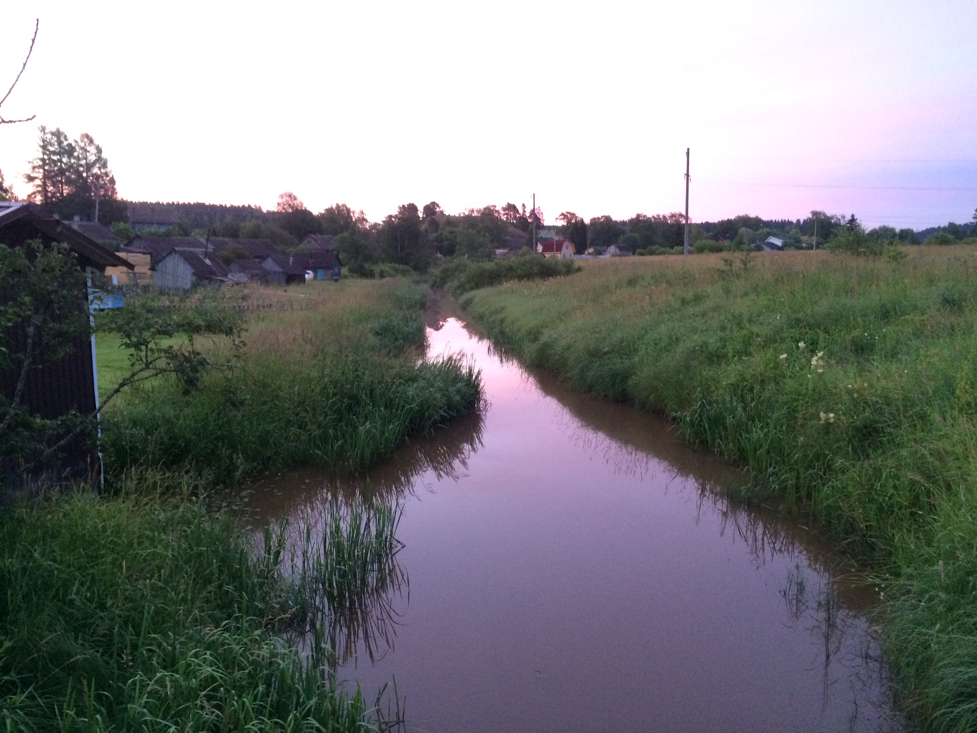 Вонкаоя